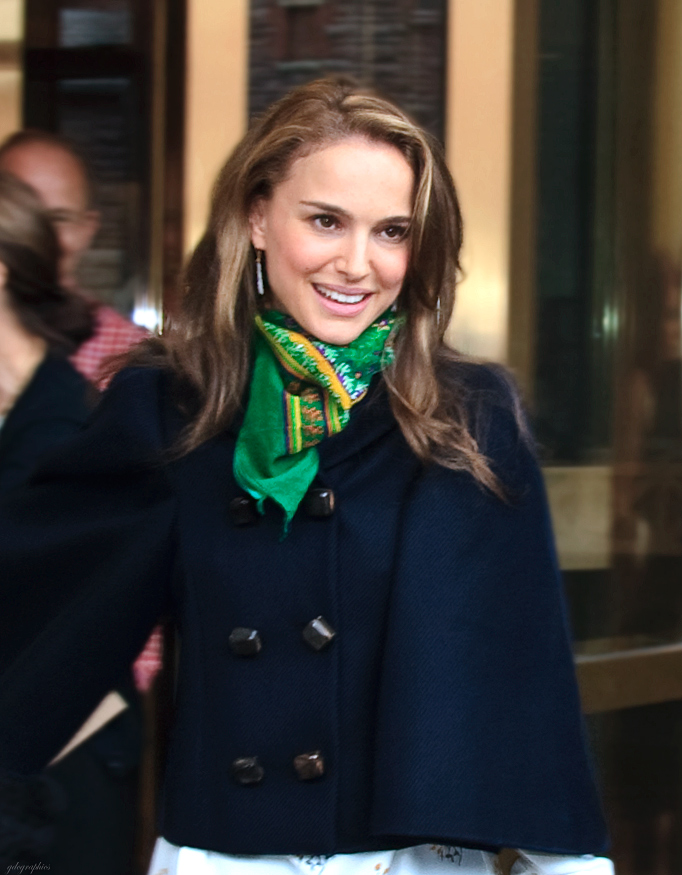 Toronto International Film Festival 2009.